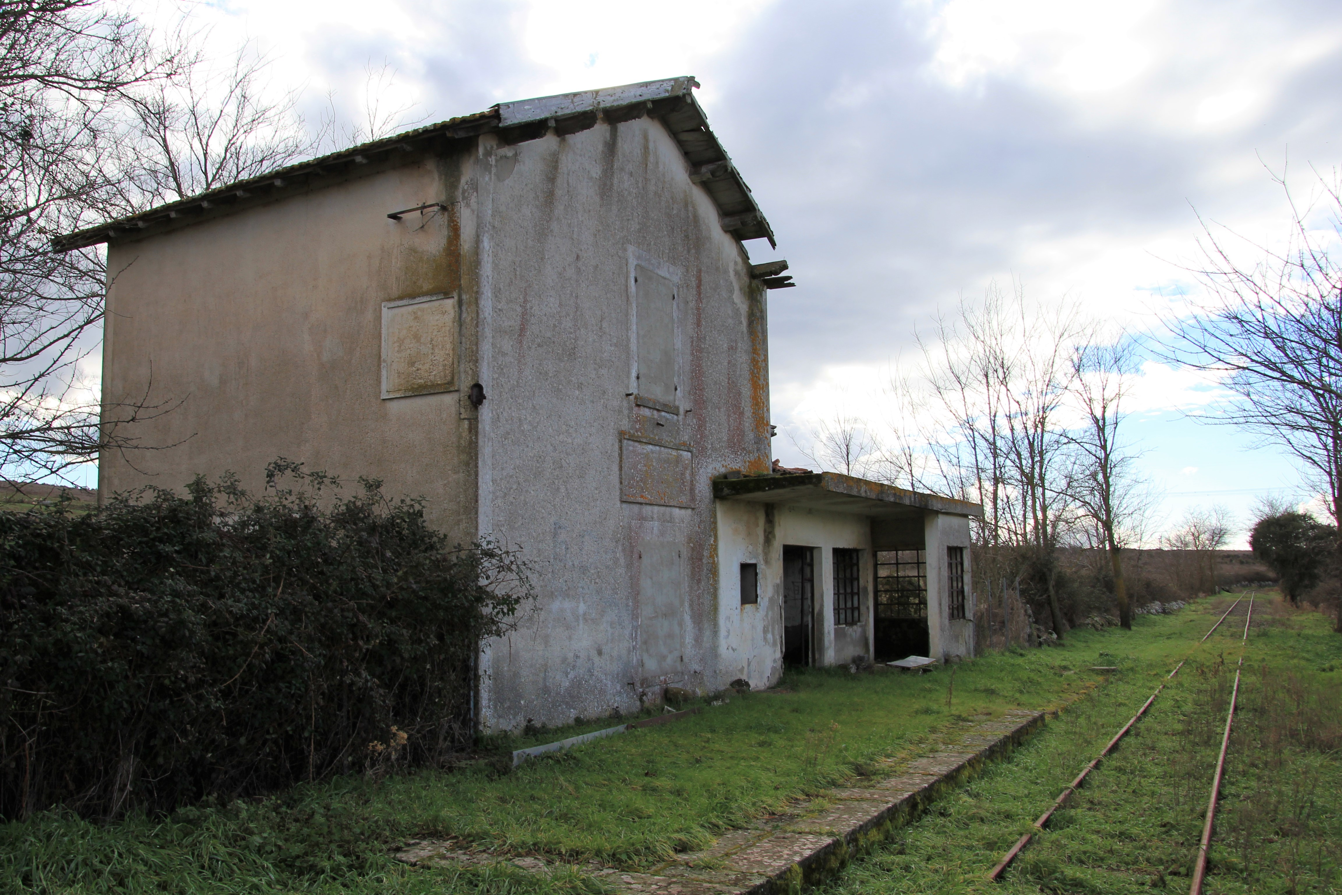 Macomer, stazione ferroviaria di Bara